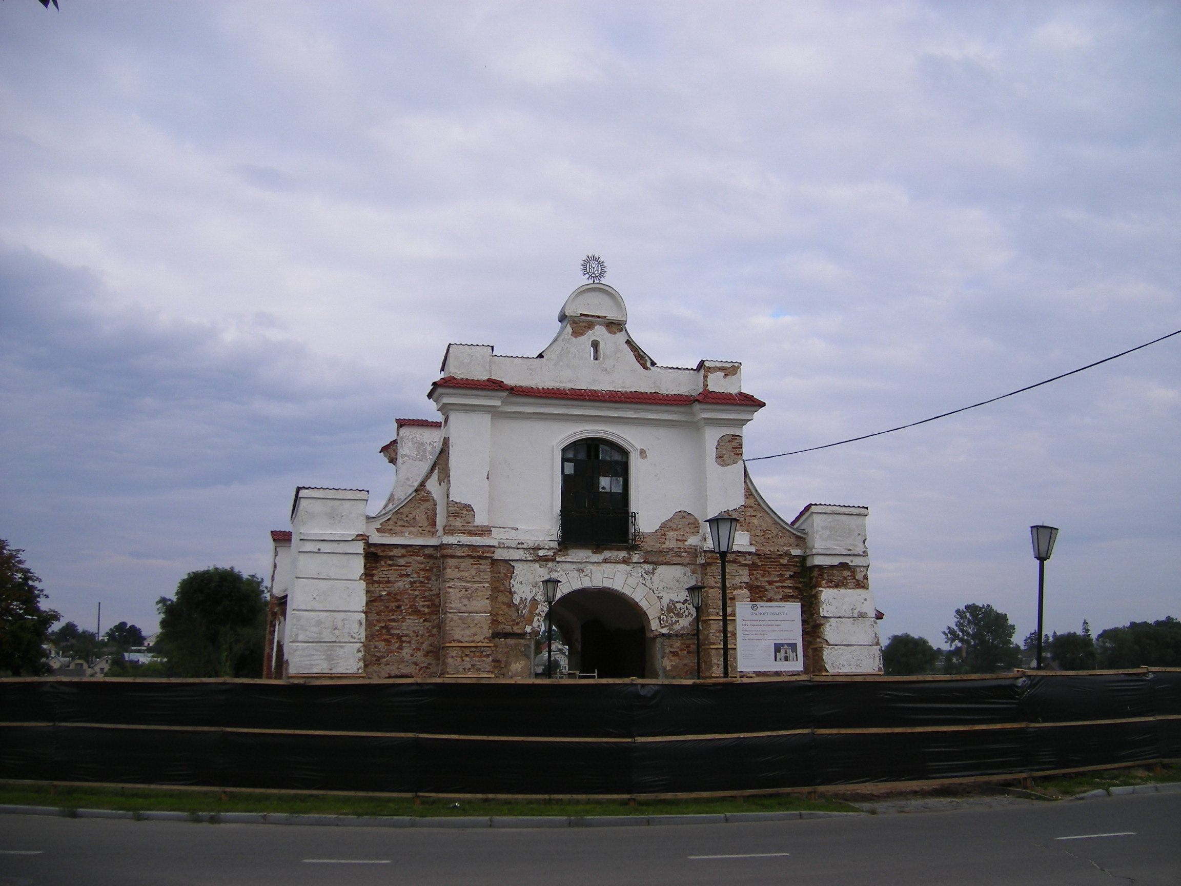 Niasvizh, Slutsk Gate